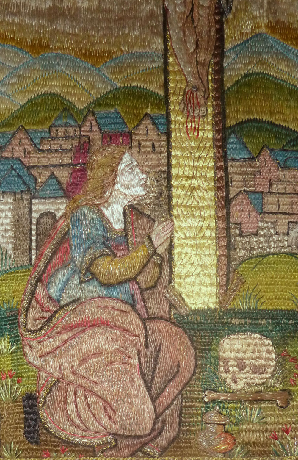 St-Joriskerk chasuble